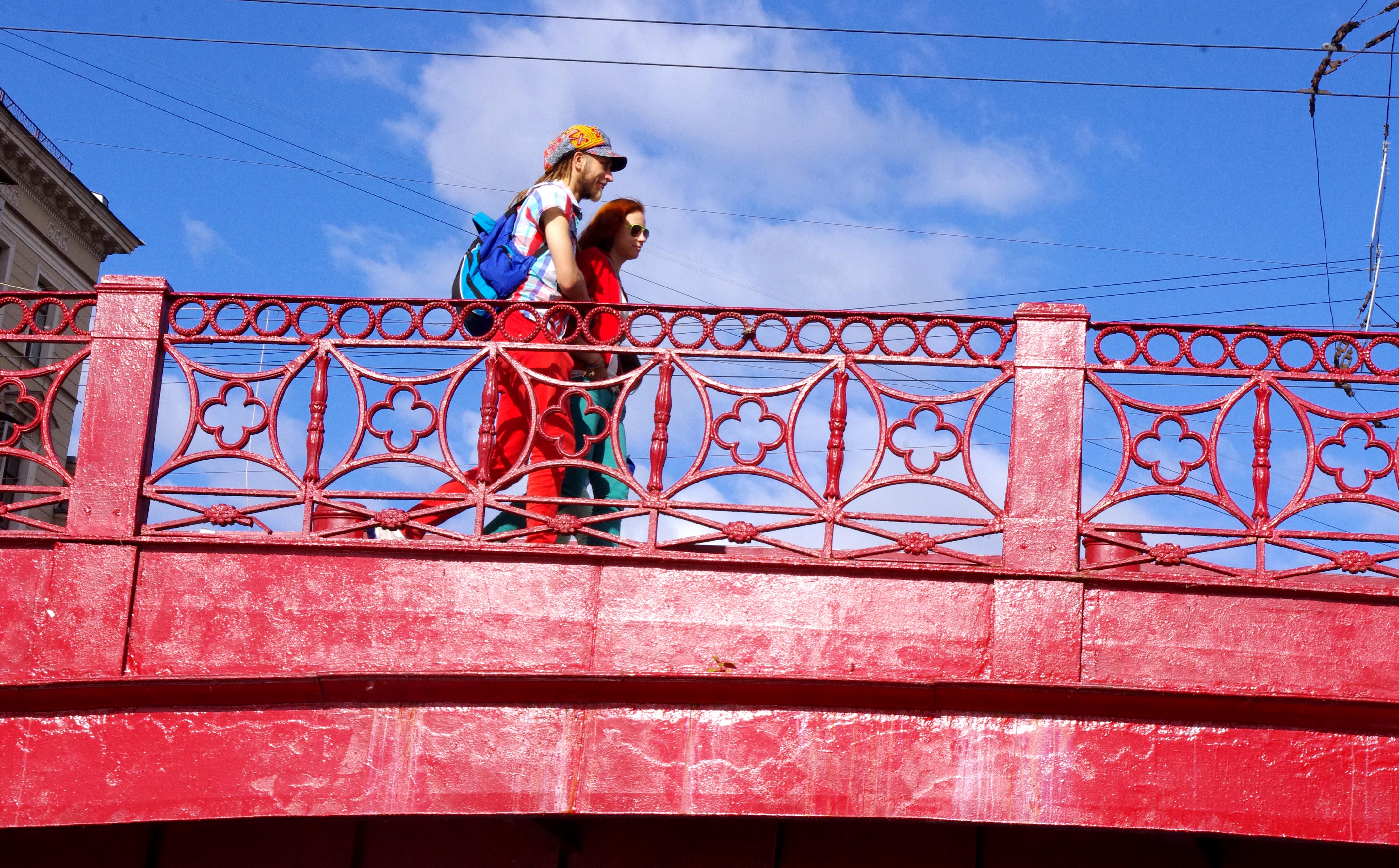 Мост Красный (Санкт-Петербург и Лен.область, Санкт-Петербург, через р. Мойку по Гороховой улица)